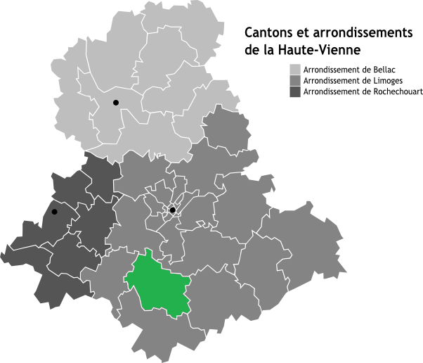 Canton de Nexon, Limousin, France en Carte des arrondissements de la Haute-Vienne